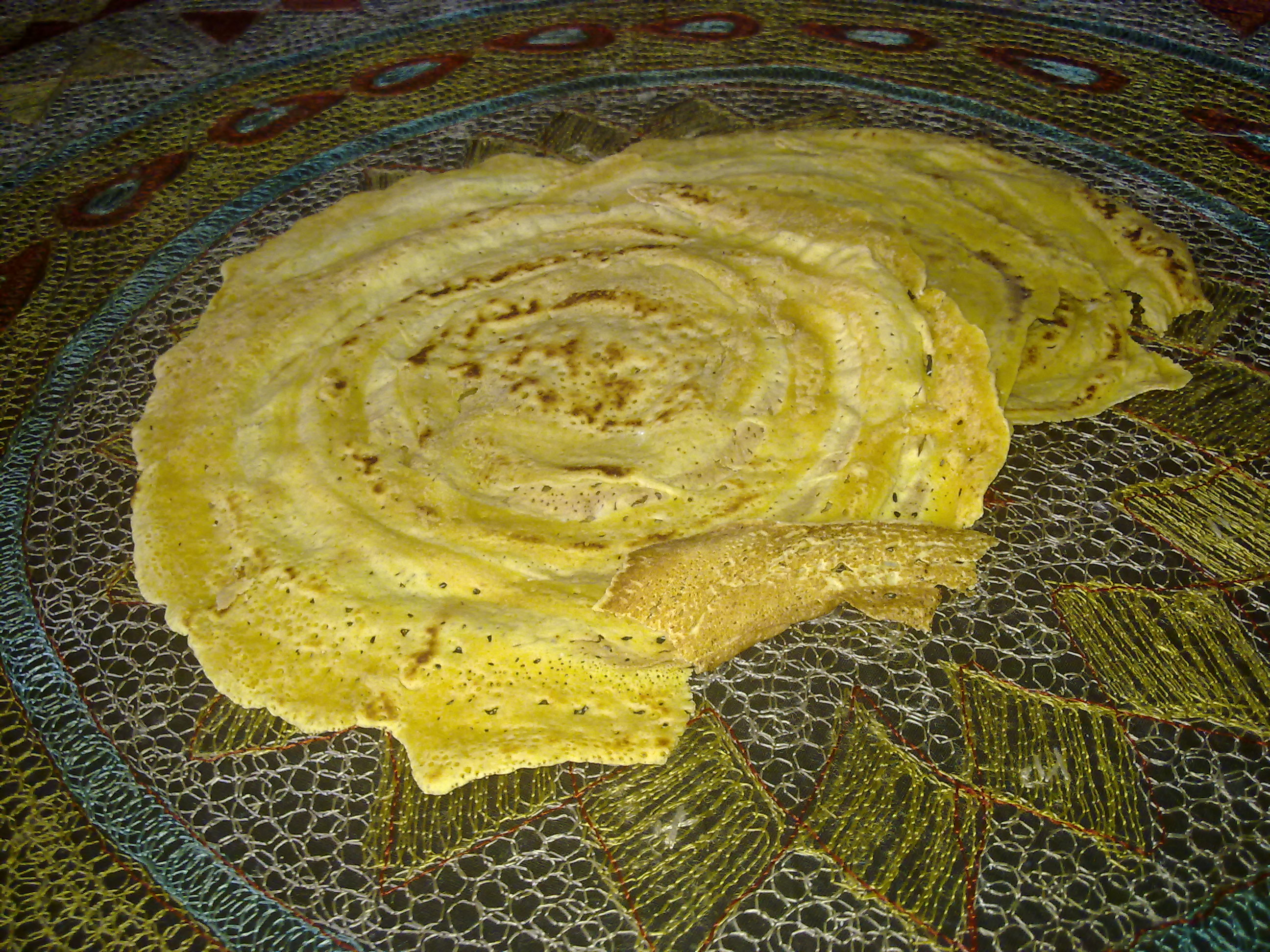 Kurdî: شلکێنە جوورێگ نان کوردیە.